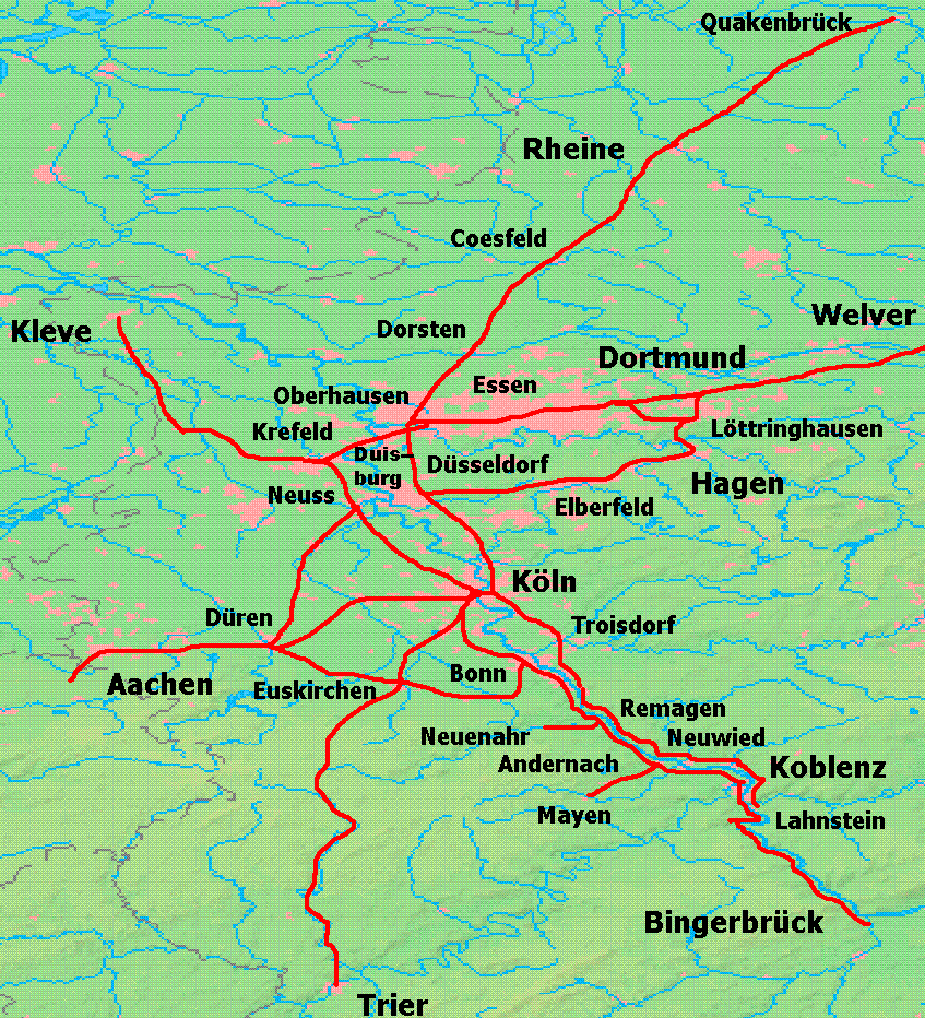 Karte der Rheinische Eisenbahn-Gesellschaft, Kartenquelle: [1]